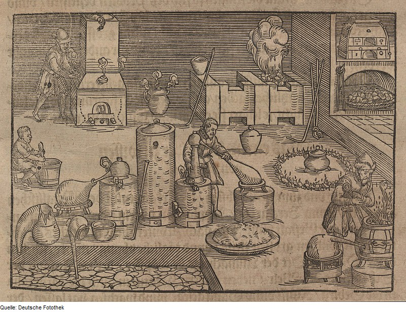 Original image description from the Deutsche Fotothek Metallurgie & Probierkunst